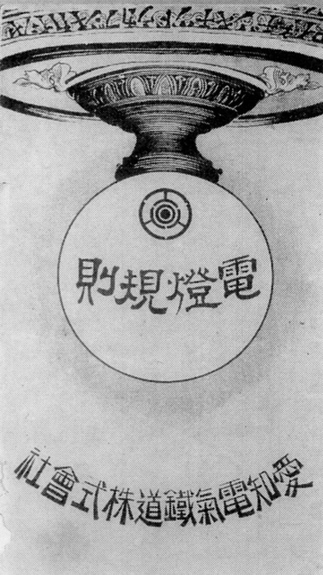 愛知電鉄の電灯規則